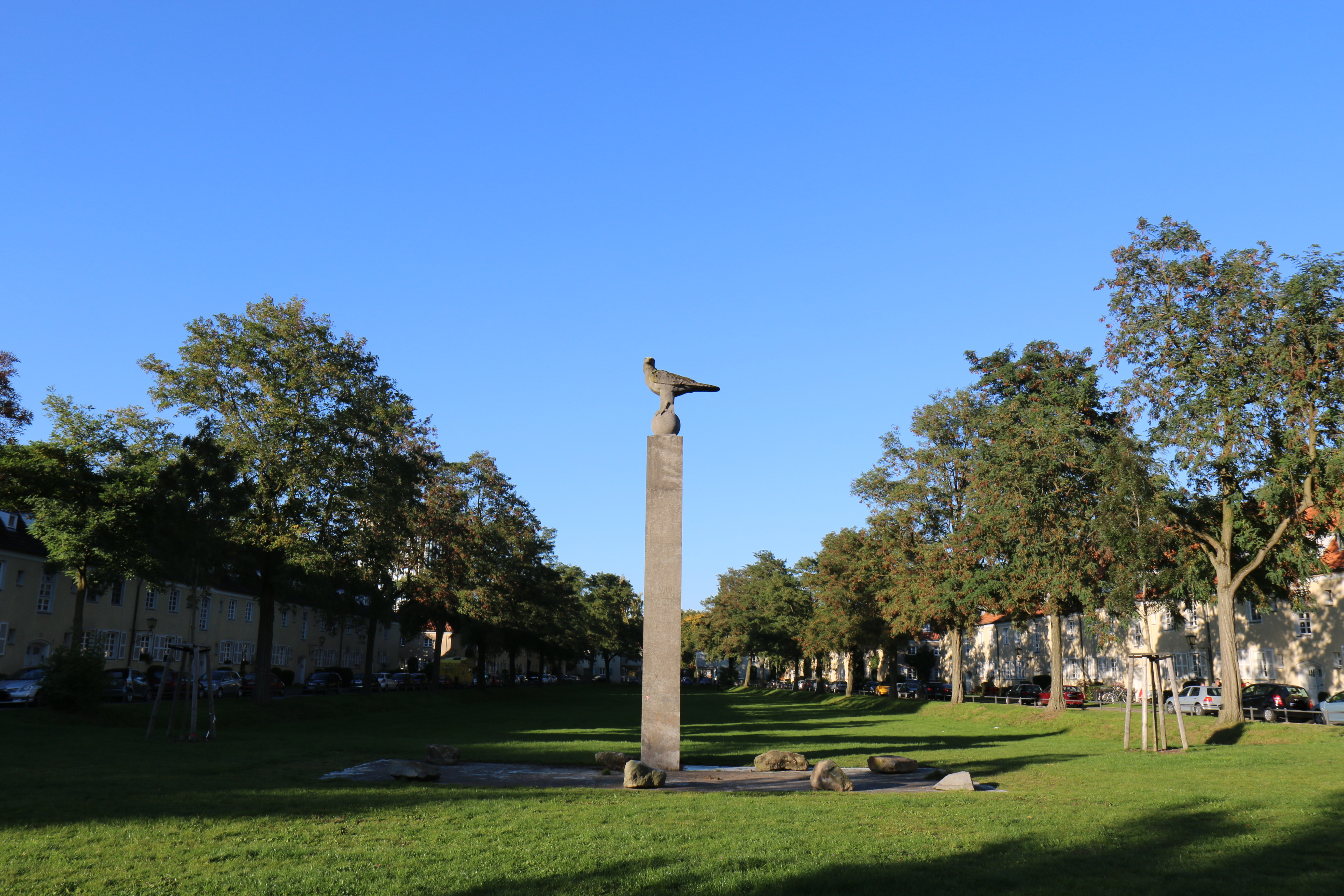 Baudenkmal in Münster (Westf.): Siedlung Grüner Grund